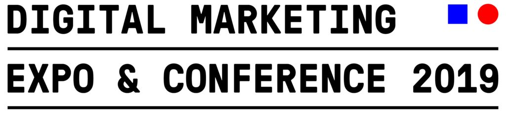 Logo DMEXCO 2019